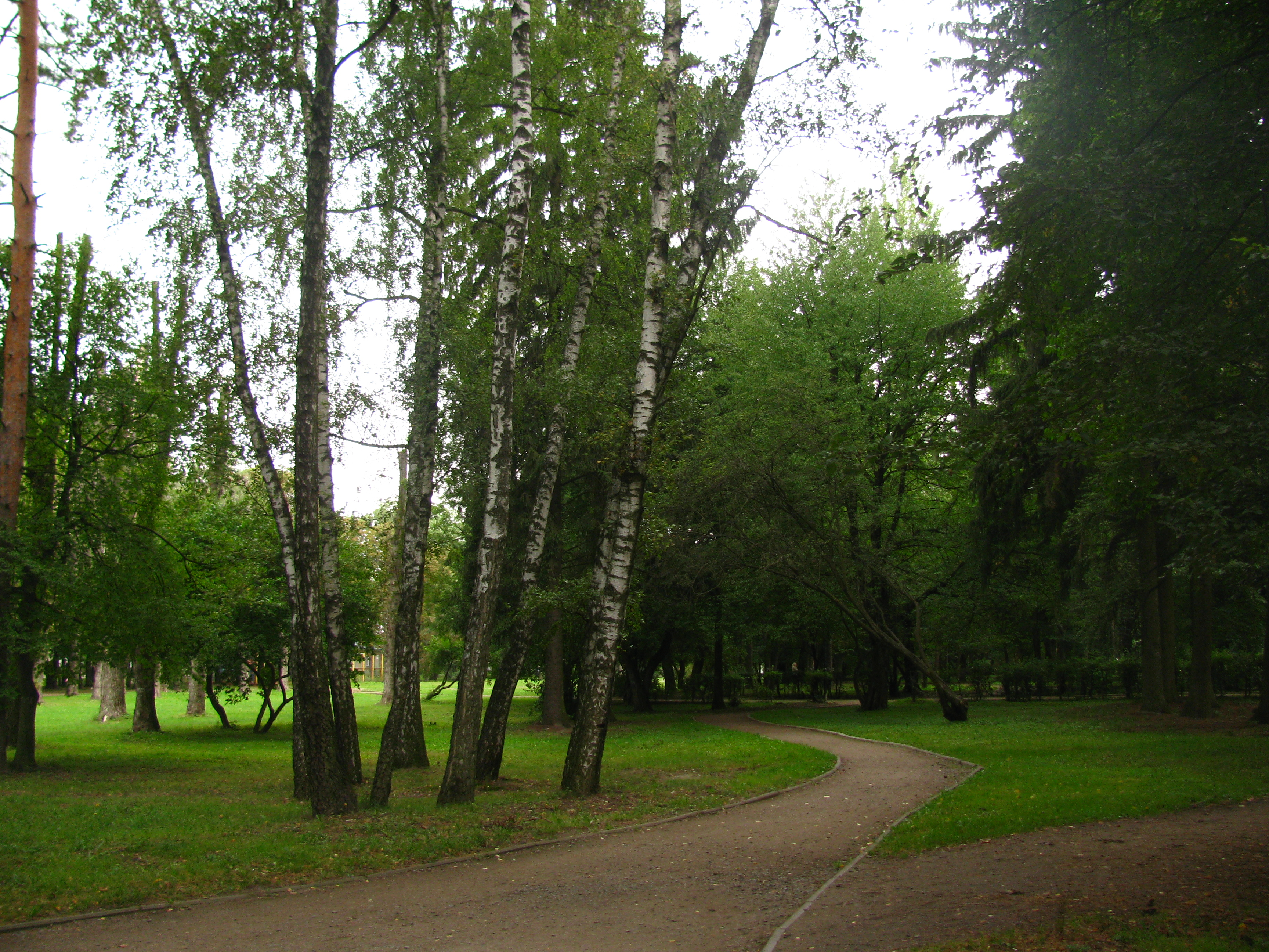 Левандівський парк у Львові на Левандівці